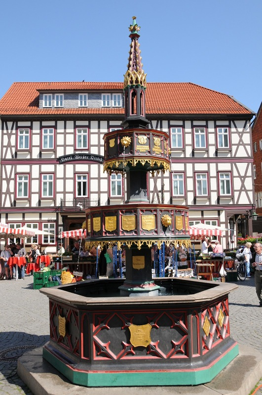 Original image description from the Deutsche Fotothek Der reich verzierte Brunnen auf dem Marktplatz vor dem historischen Fachwerkrathaus. Aufgenommen im Mai 2008. Foto Uwe Gerig